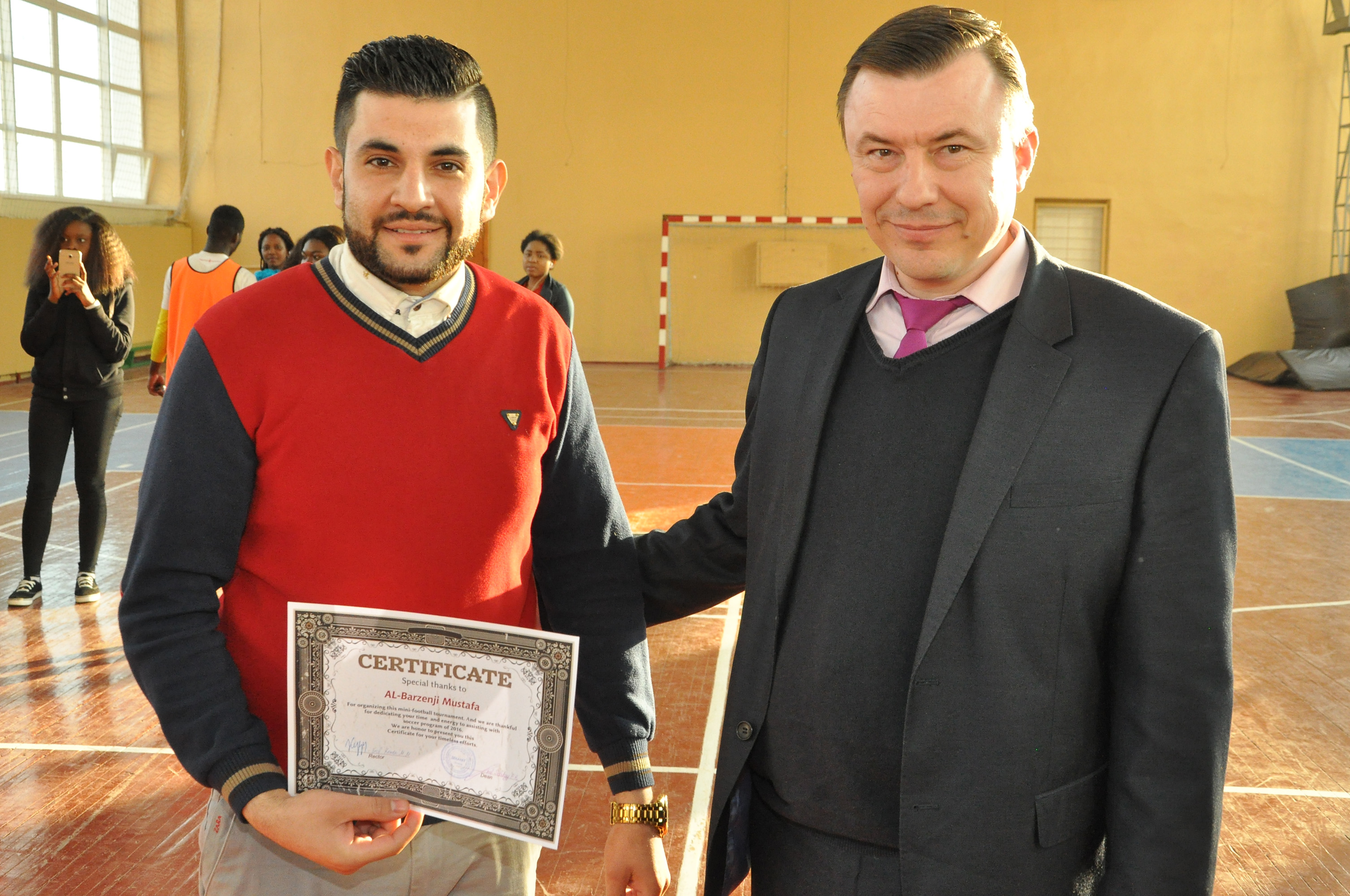 Міні-футбол «Ліга чемпіонів» Тернопільського державного медичного університету імені І. Я. Горбачевського. Півфінальні та фінальний поєдинки 26 квітня 2016 року. Нагороди вручає декан факультету іноземних студентів Петро Сельський.